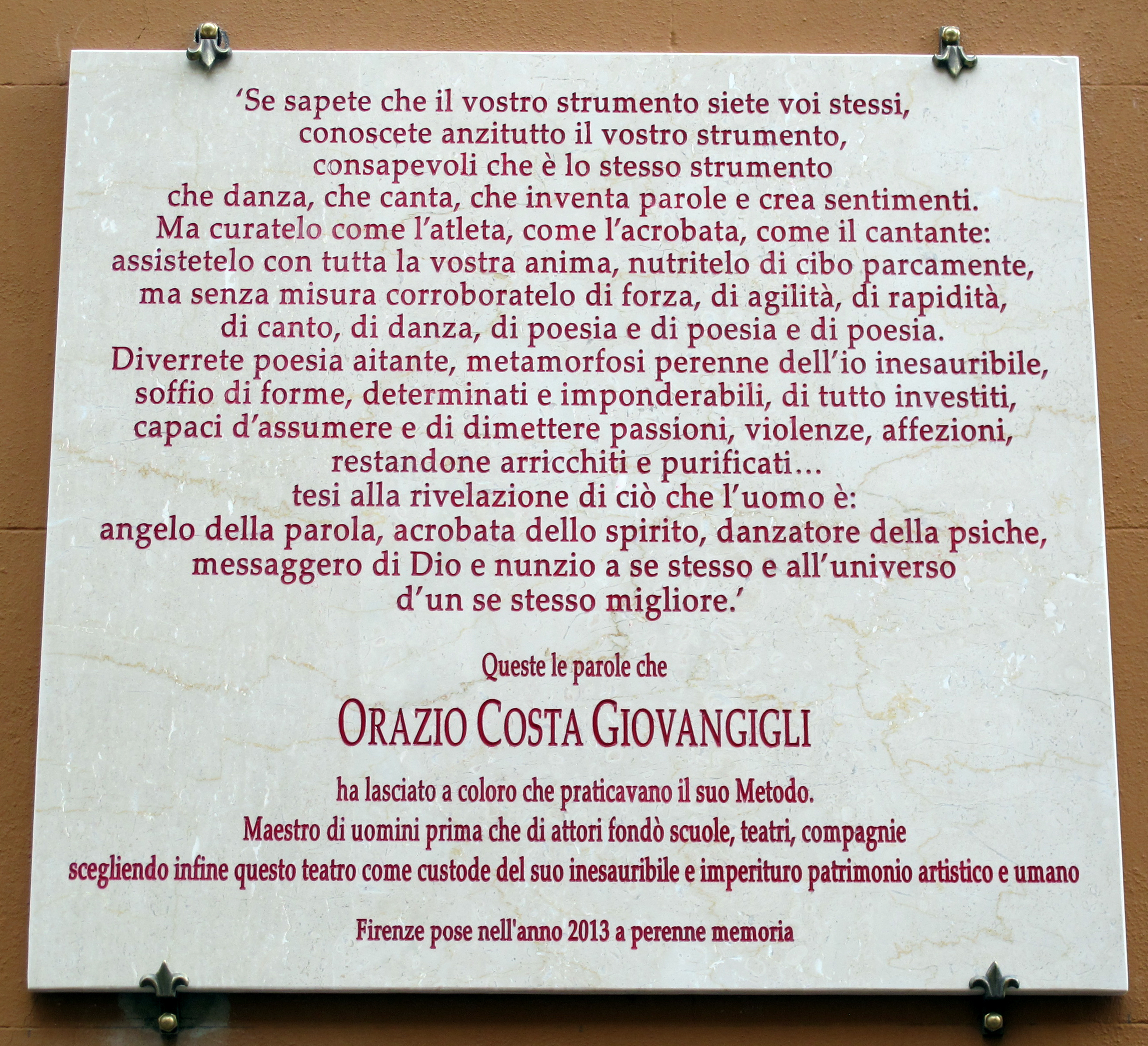 Firenze